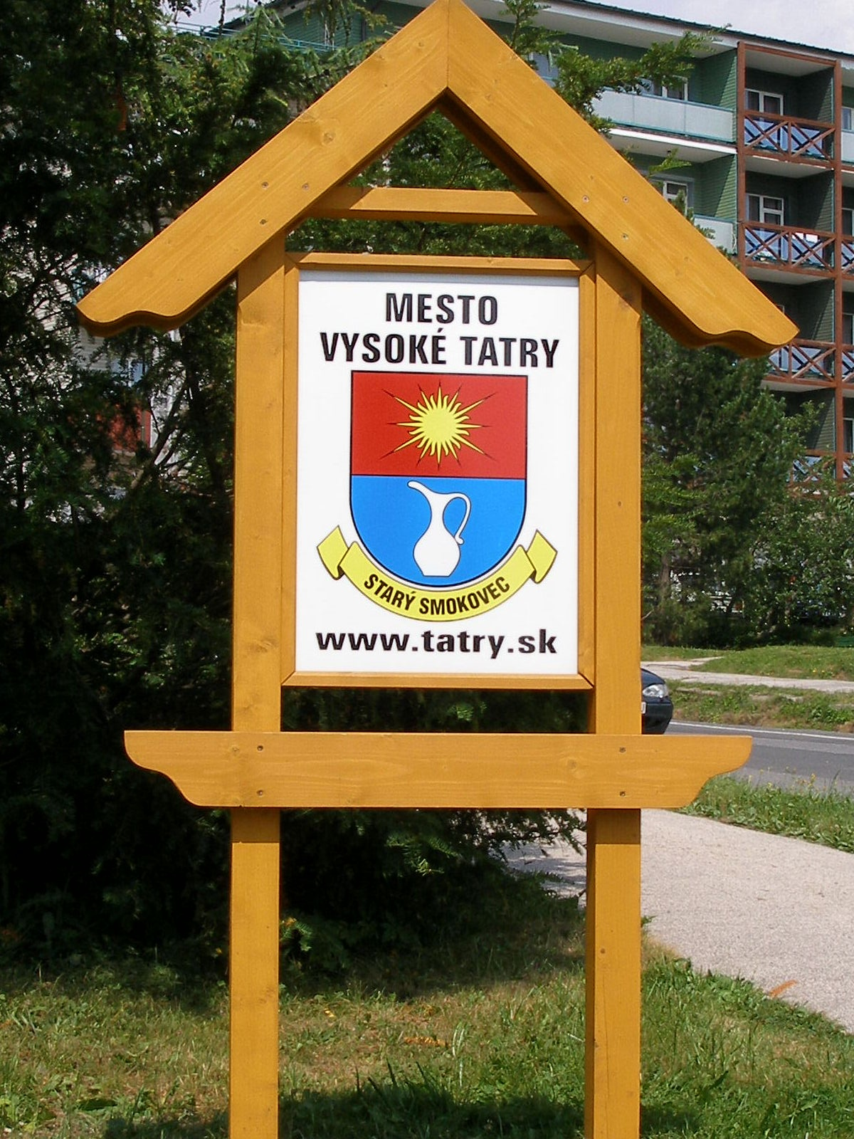 Starý Smokovec, miestny znak osady